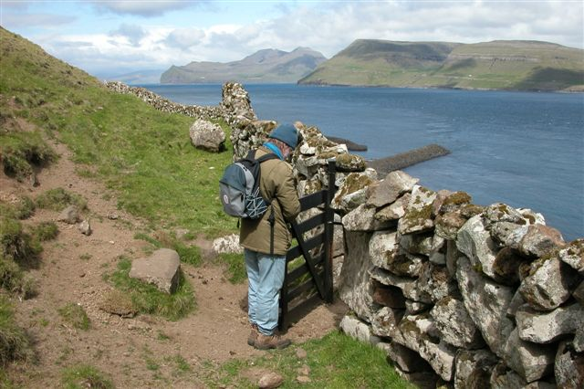 Hestur, Faroe Islands